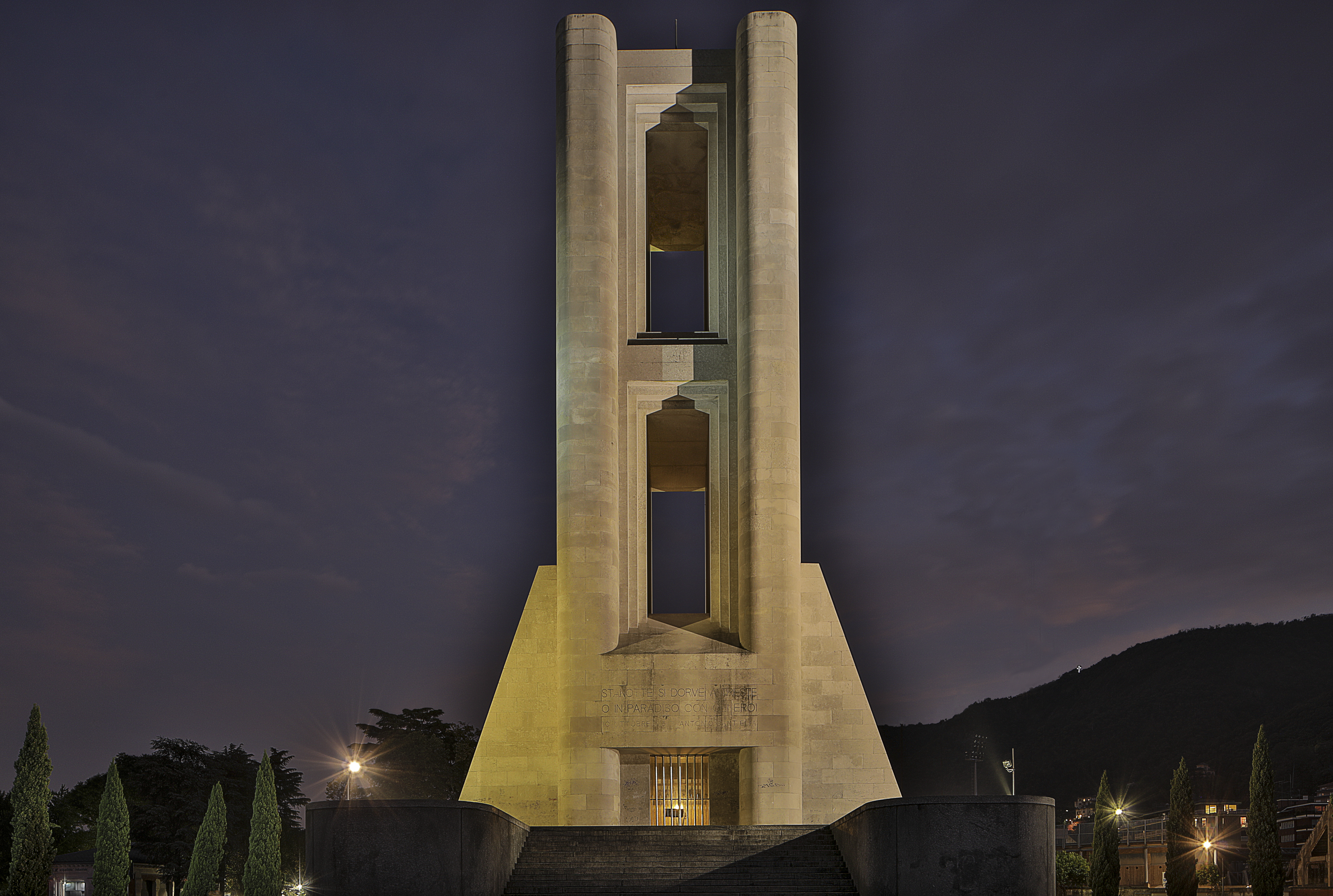 monumento ai caduti This is a photo of a monument which is part of cultural heritage of Italy.